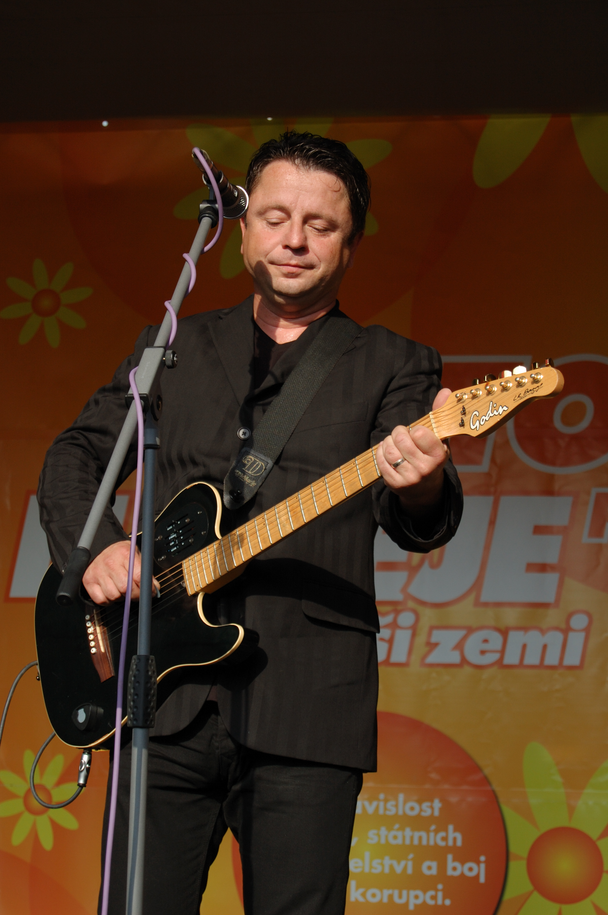 Petr Muk